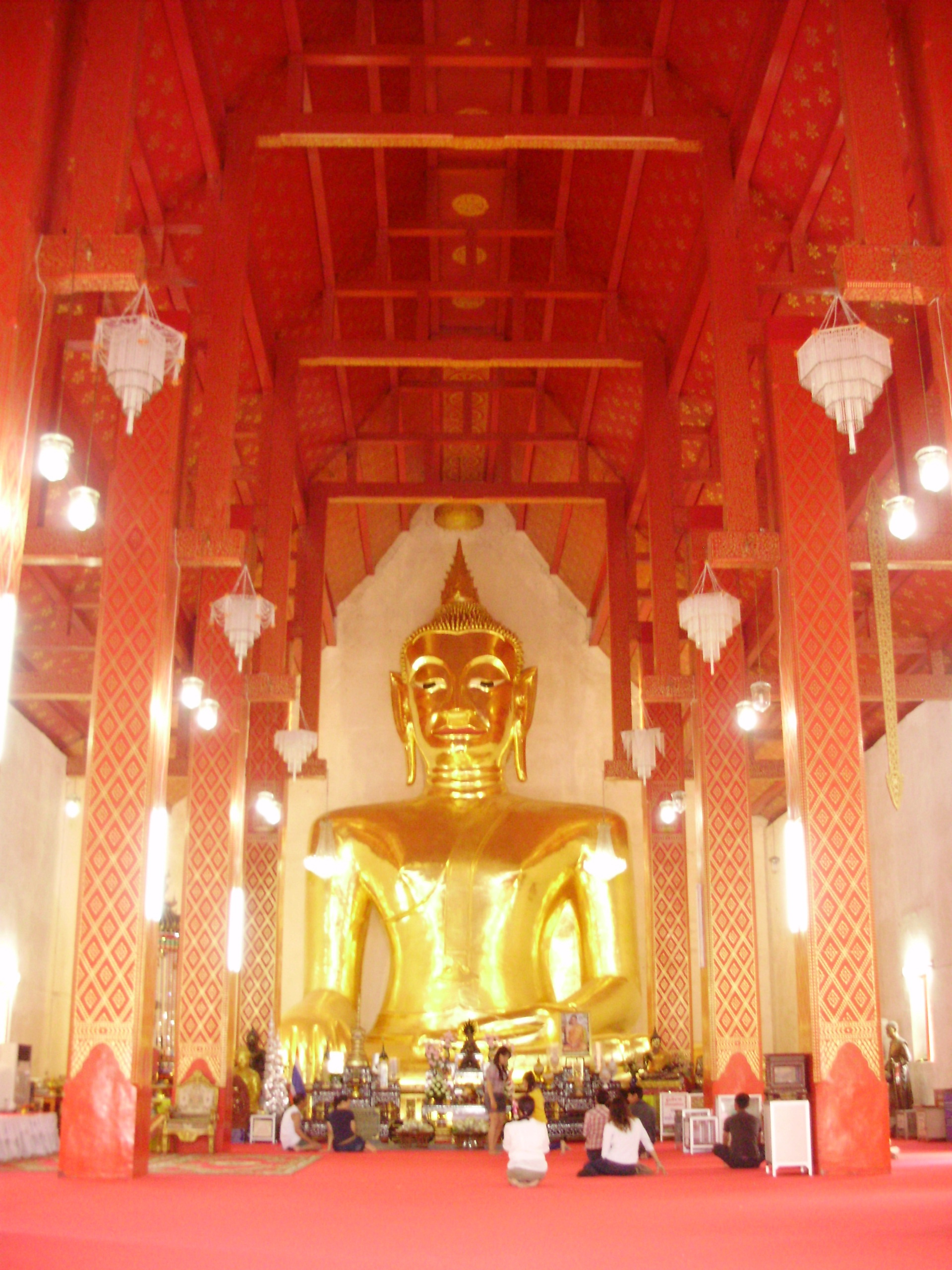 วัดศรีโคมคำ (วัดพระเจ้าตนหลวง) ต.เวียง อ.เมืองพะเยา จ.พะเยา